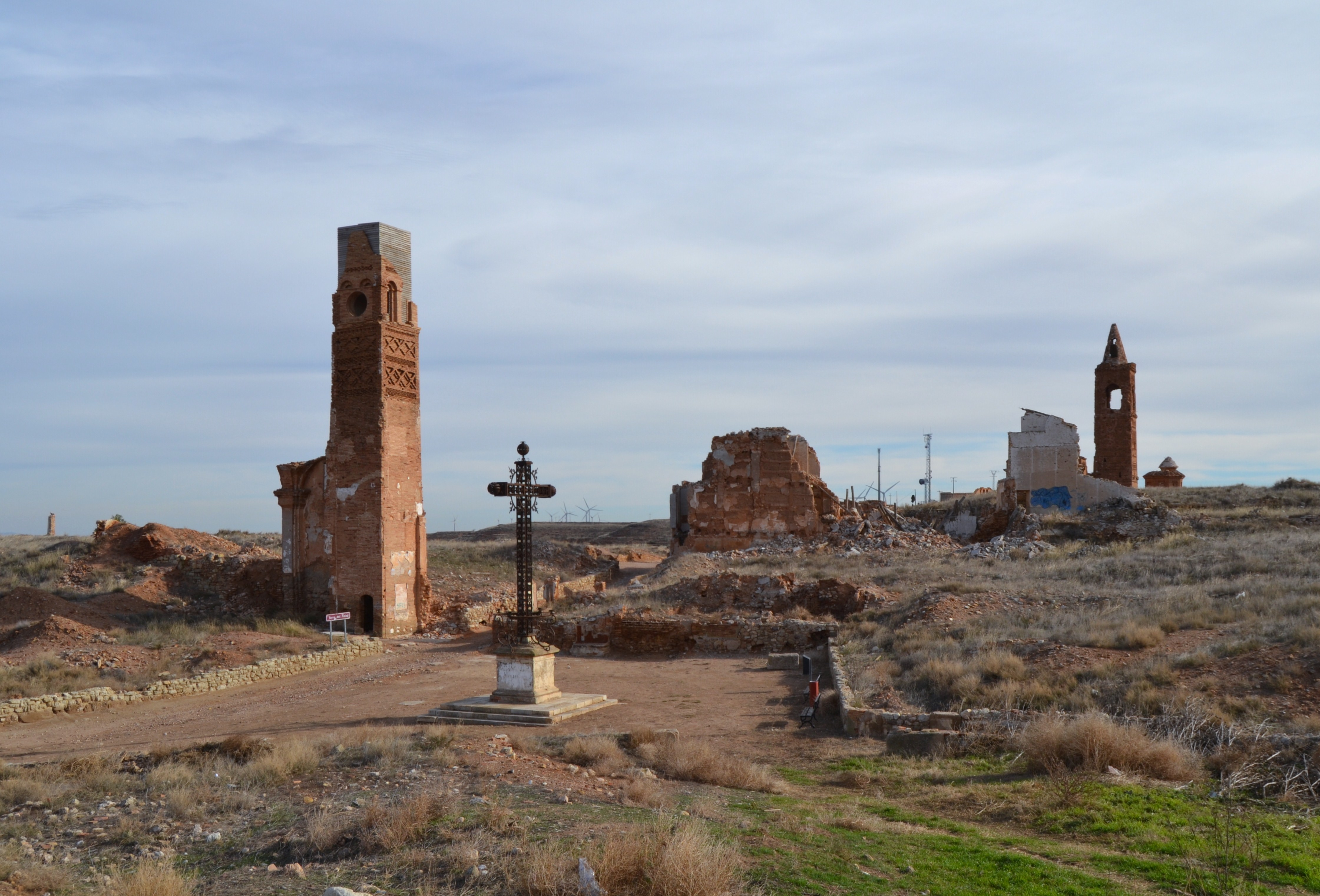 Ambista de Belchit.